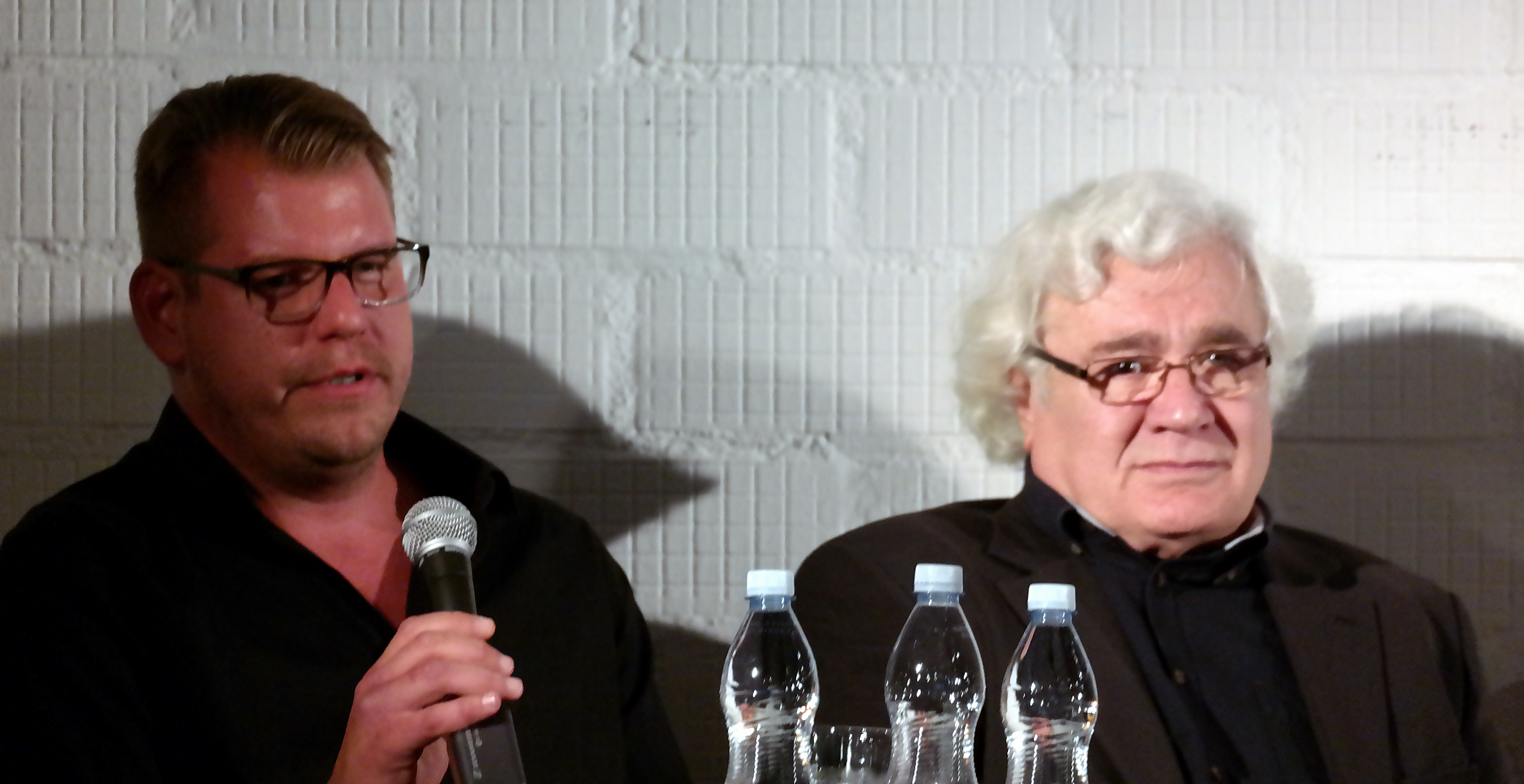 Bodó Viktor és Székely Gábor (Budapesti Katona József Színház - Kantin. A második életmű című könyv bemutatója)